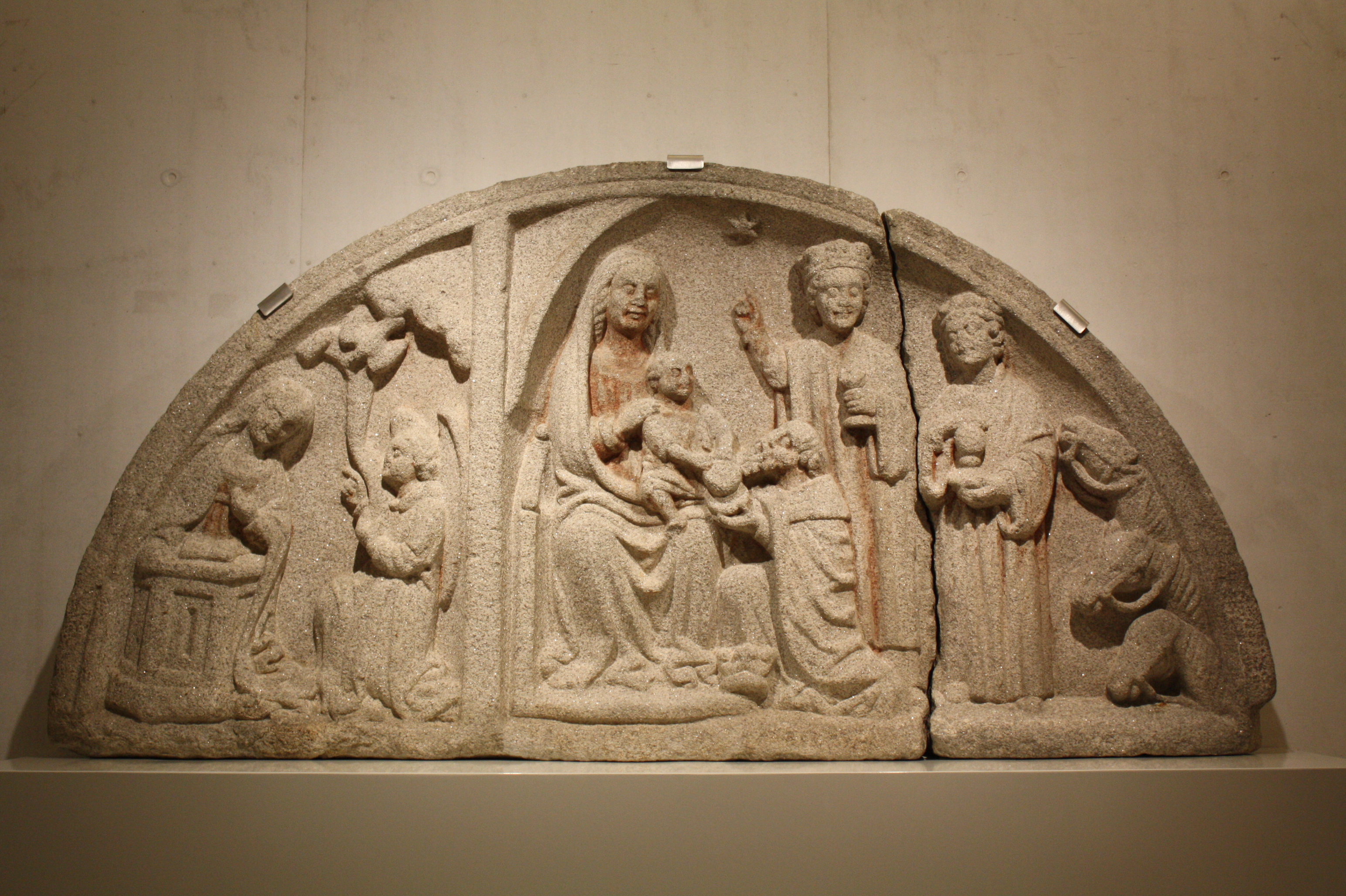 Tímpano gótico (ca. 1480) procedente da igrexa de Santa María de Vigo (Pontevedra), destruída en 1809. Exponse no Museo de Pontevedra.